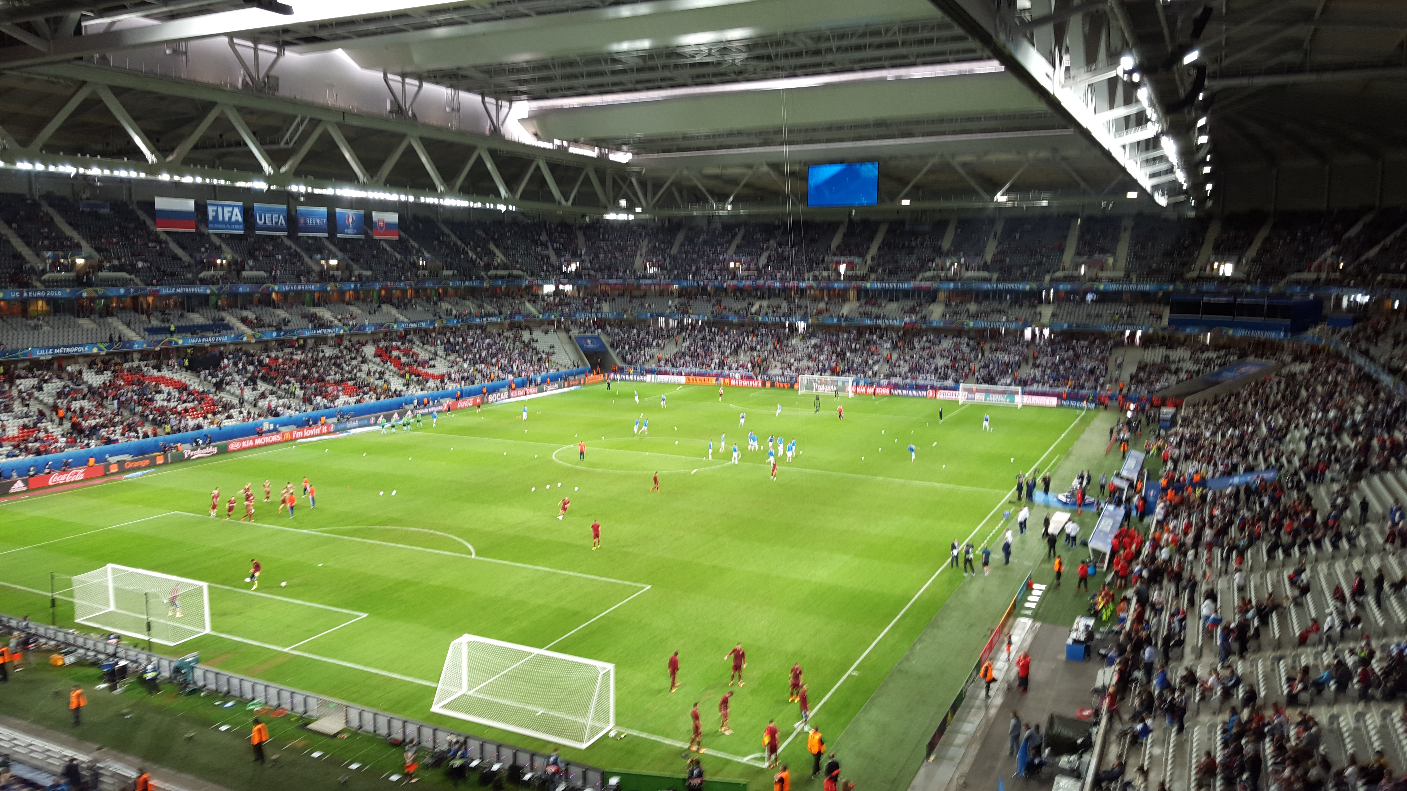 Le Stade Pierre-Mauroy de Villeneuve d'Ascq, le 15 juin 2016, avant la rencontre Russie-Slovaquie, comptant pour le championnat d'Europe de football 2016